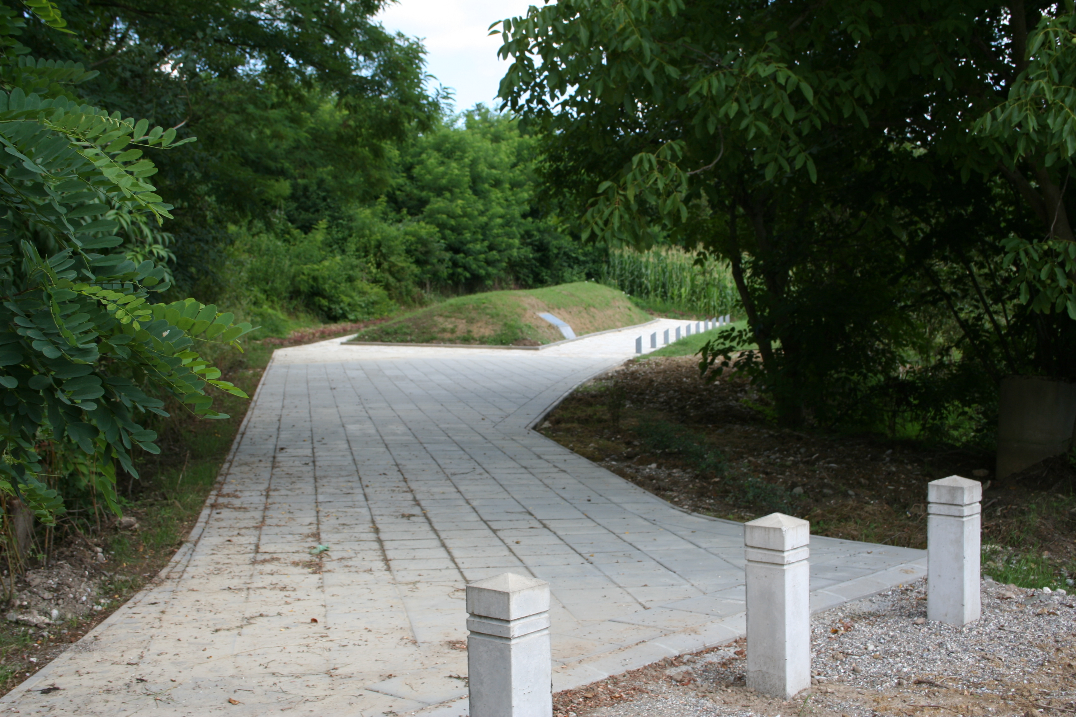 Spomenik i kosturnica, mesto streljanja, Draginac